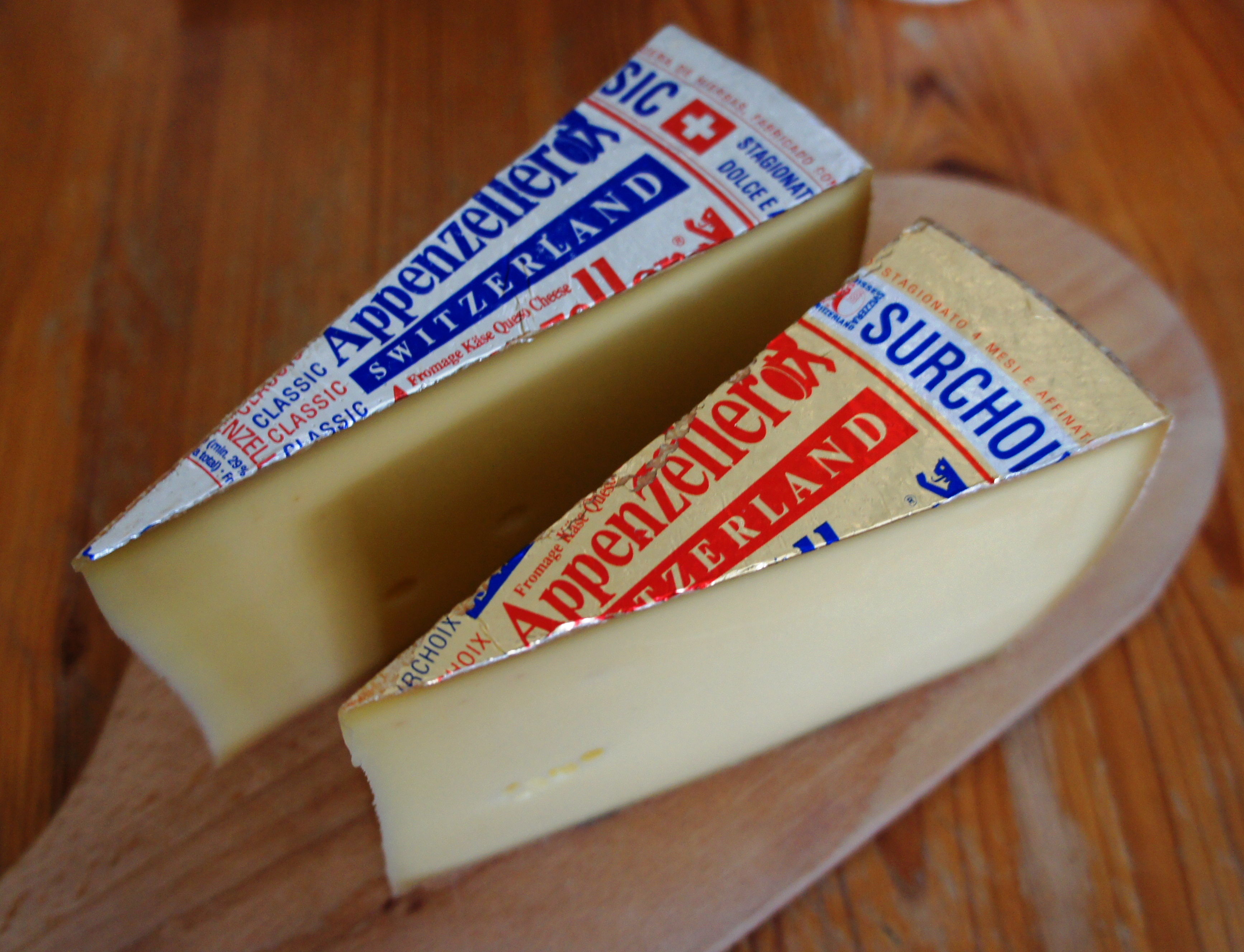 Zwei Stücke Appenzeller Käse - Appenzeller Classic (links) und Appenzeller Surchoix (rechts).